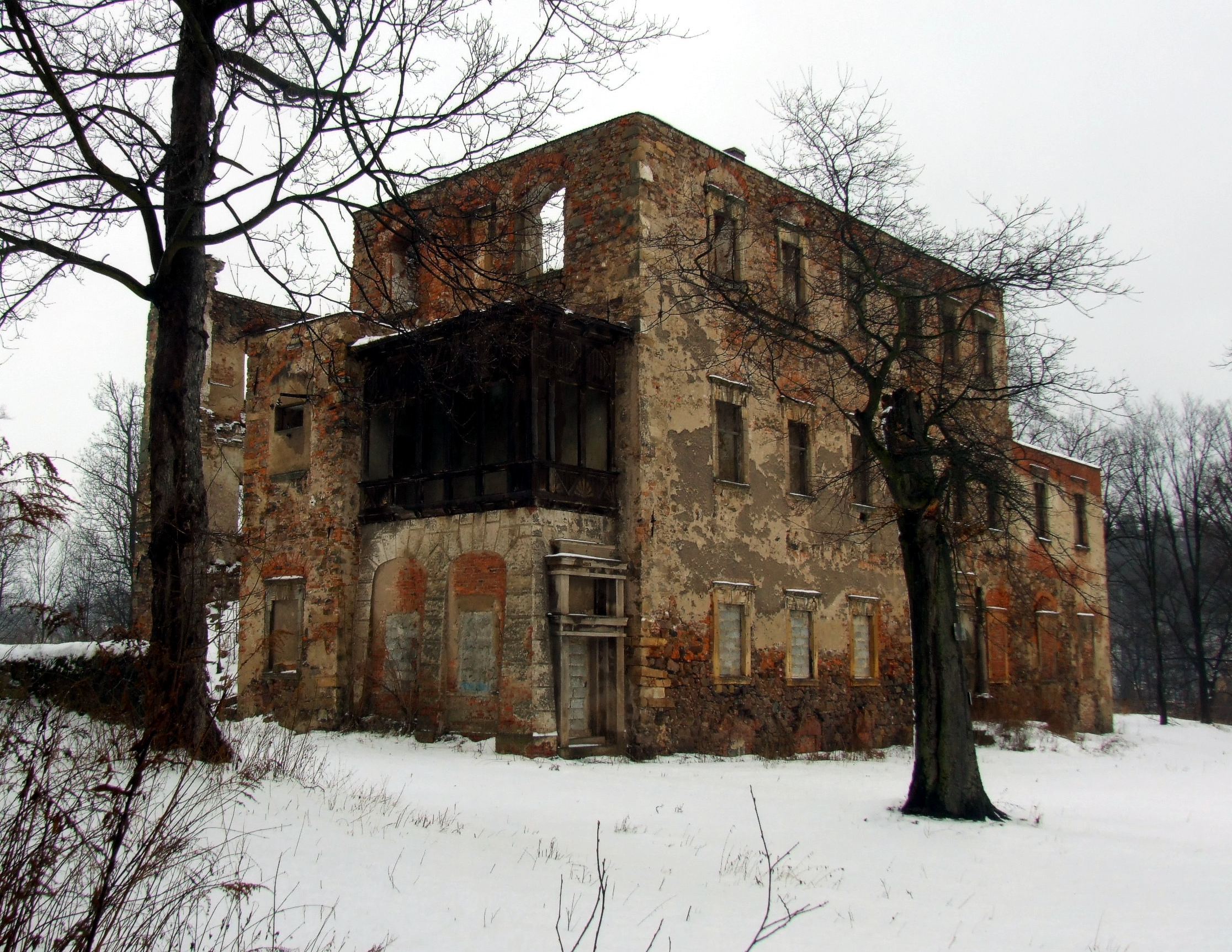 Stara Kraśnica - dwór renesansowy (ruina), XVI, pocz. XVII, XIX